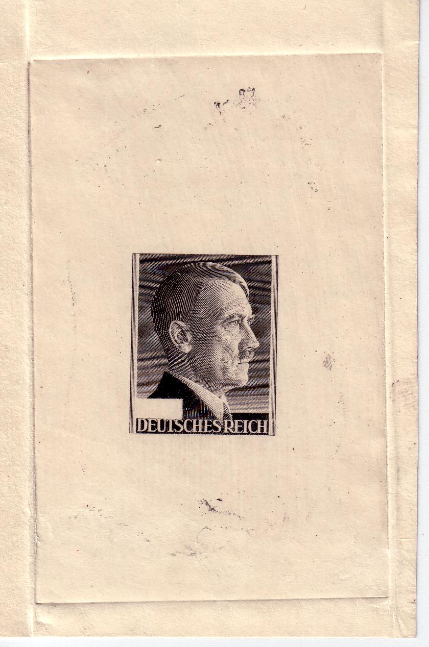 Einzelabzug der Deutschen Reichspost